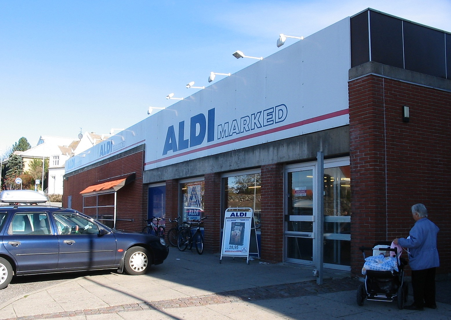 ALDI marked Picture taken in Hjørring, 2004